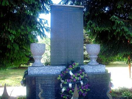 A sztálinizmus helyi áldozatainak emlékműve Csongoron, Kárpátalja